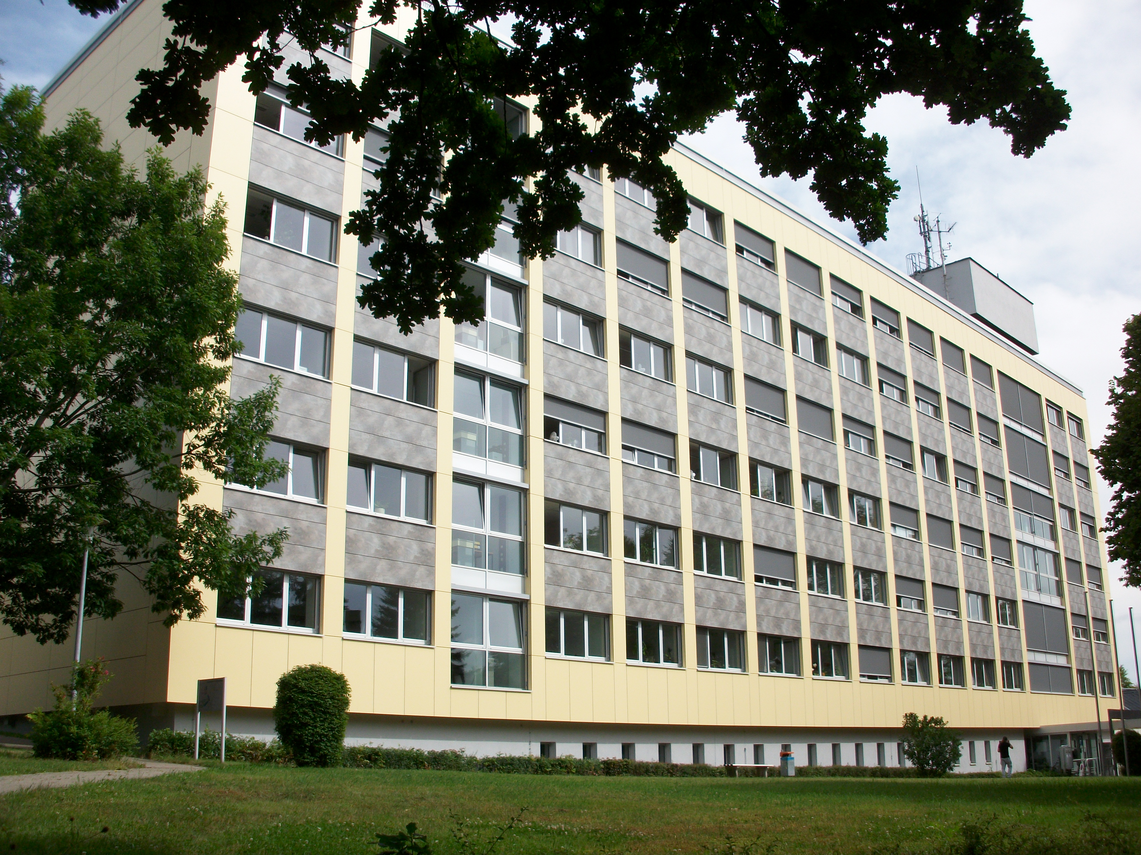 Landratsamt Mittweida, Neubaugebäude